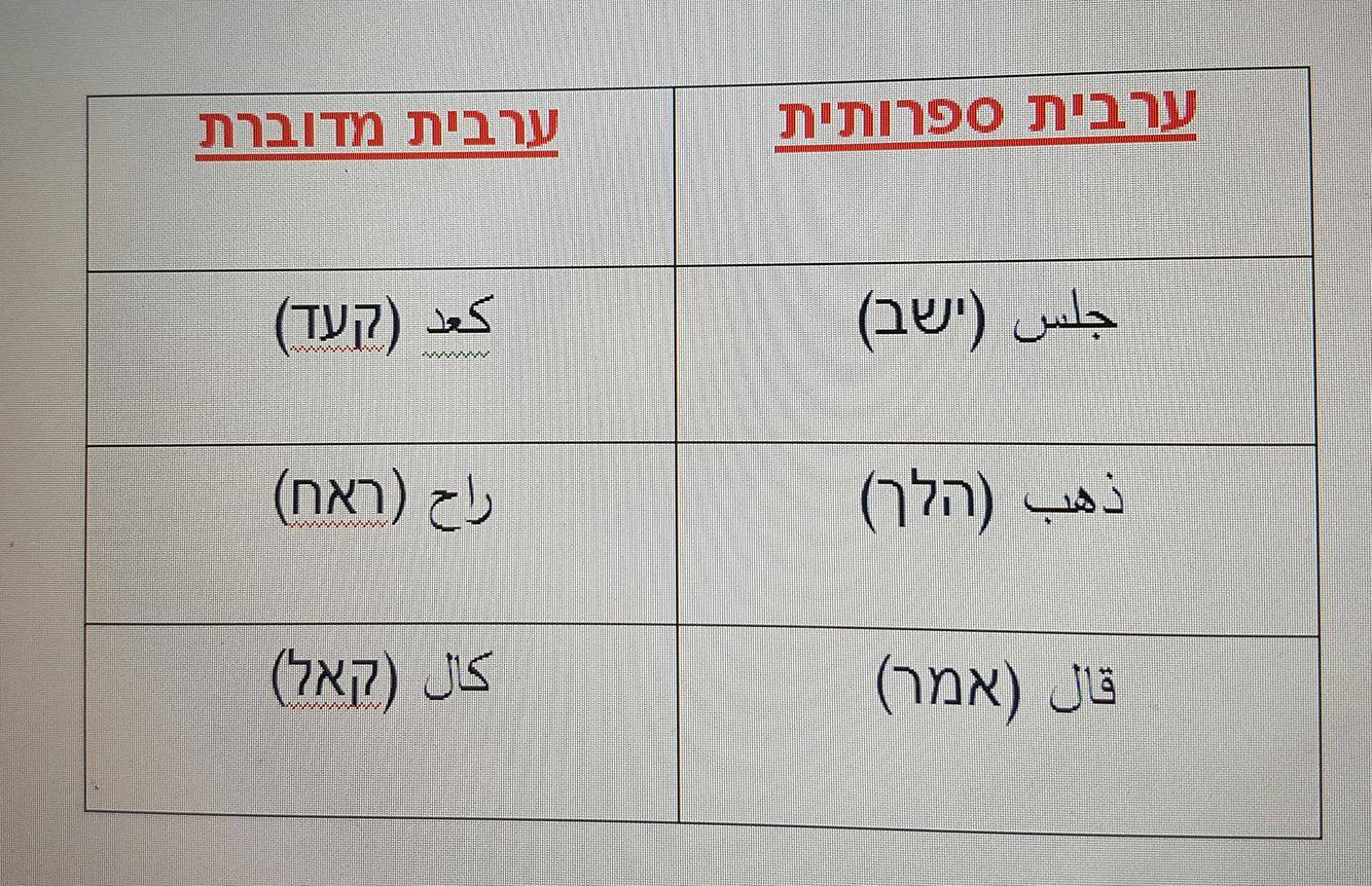 דוגמאות לדיגלוסיה בשפה הערבית